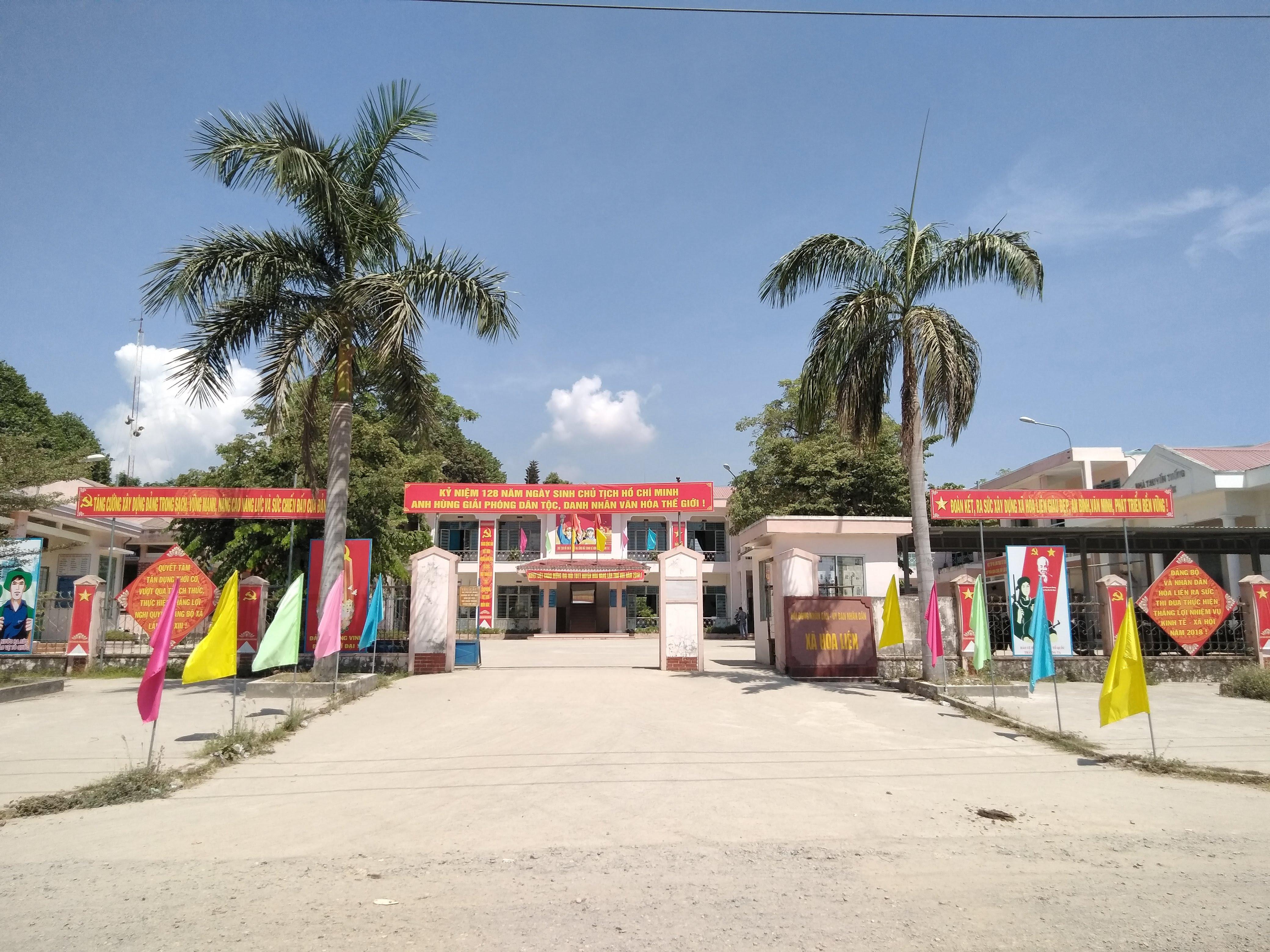 UBND xã Hòa Liên, Hòa Vang, Đà Nẵng